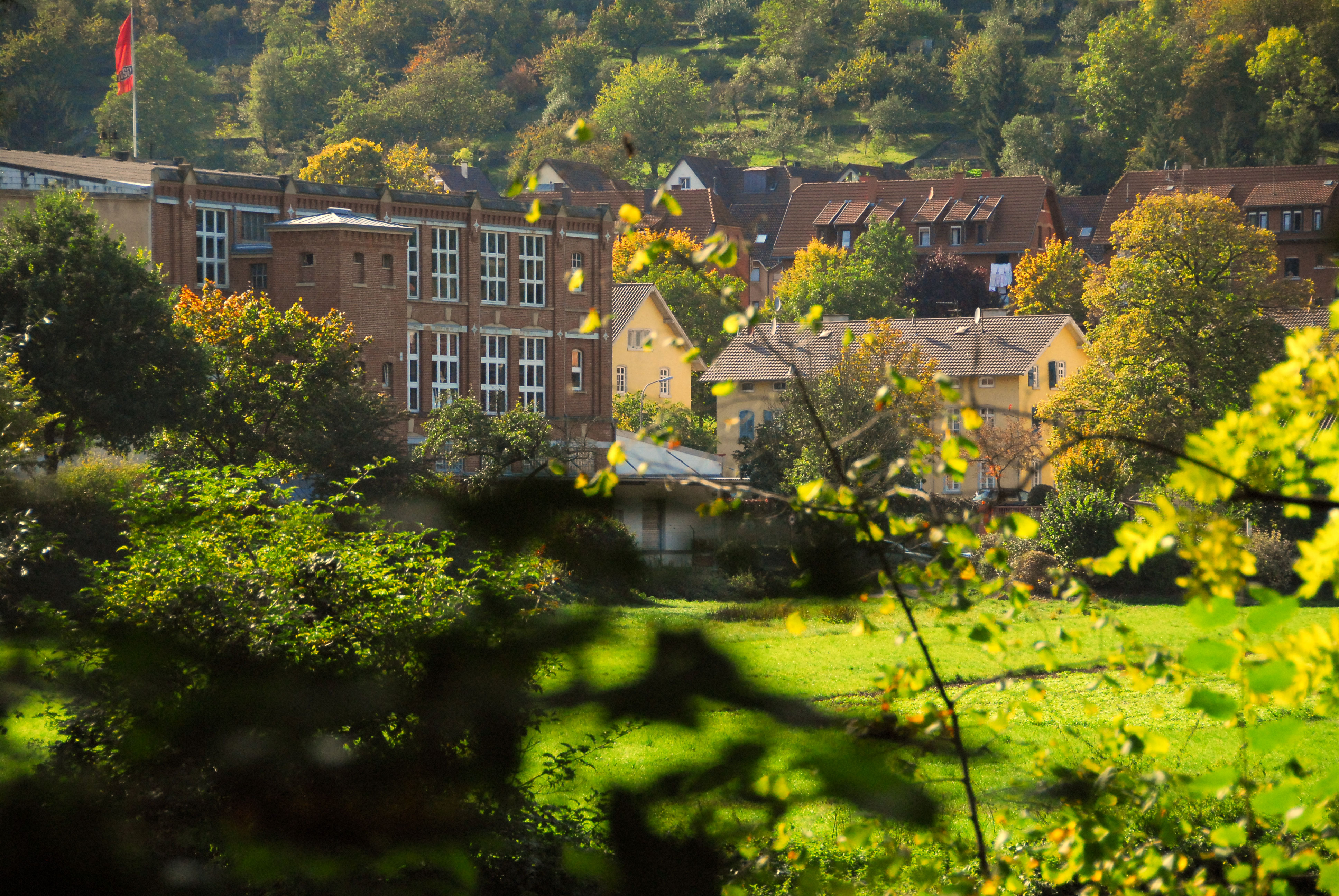 Stadtteil Kammgarnspinnerei von Bietigheim-Bissingen